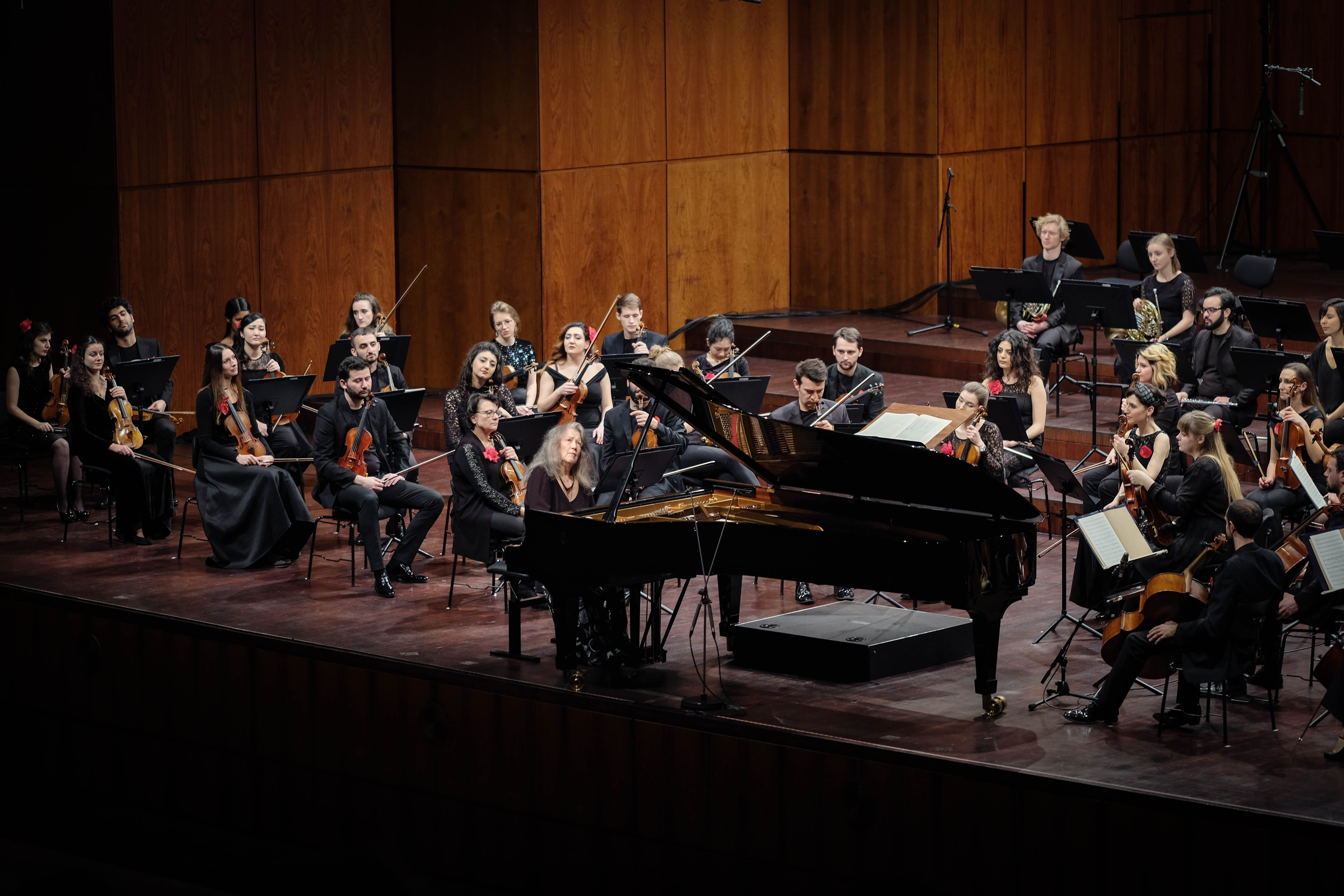 Konzert mit Martha Argerich